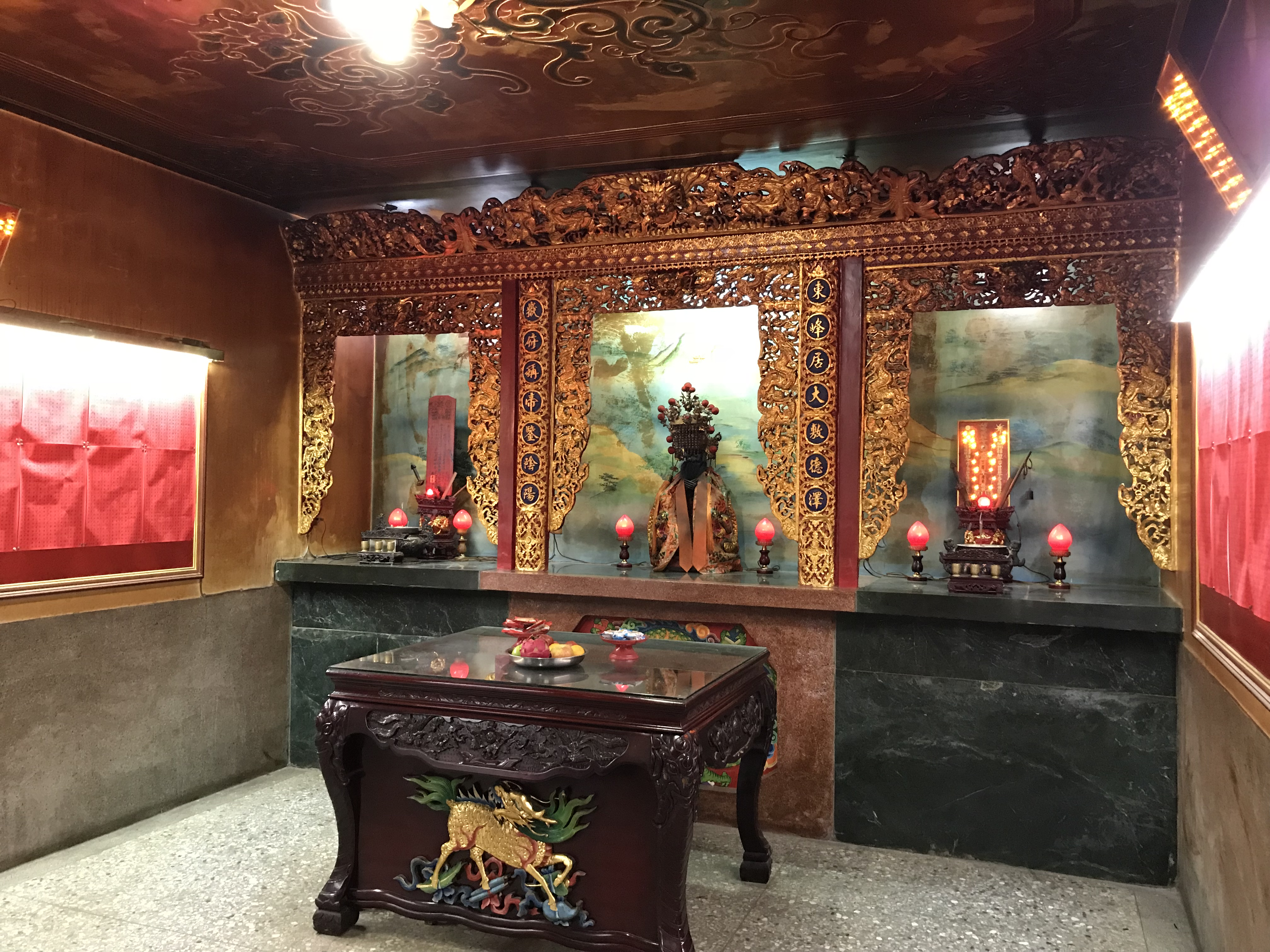 中文（台灣）: 天乙宮東嶽大帝偏殿